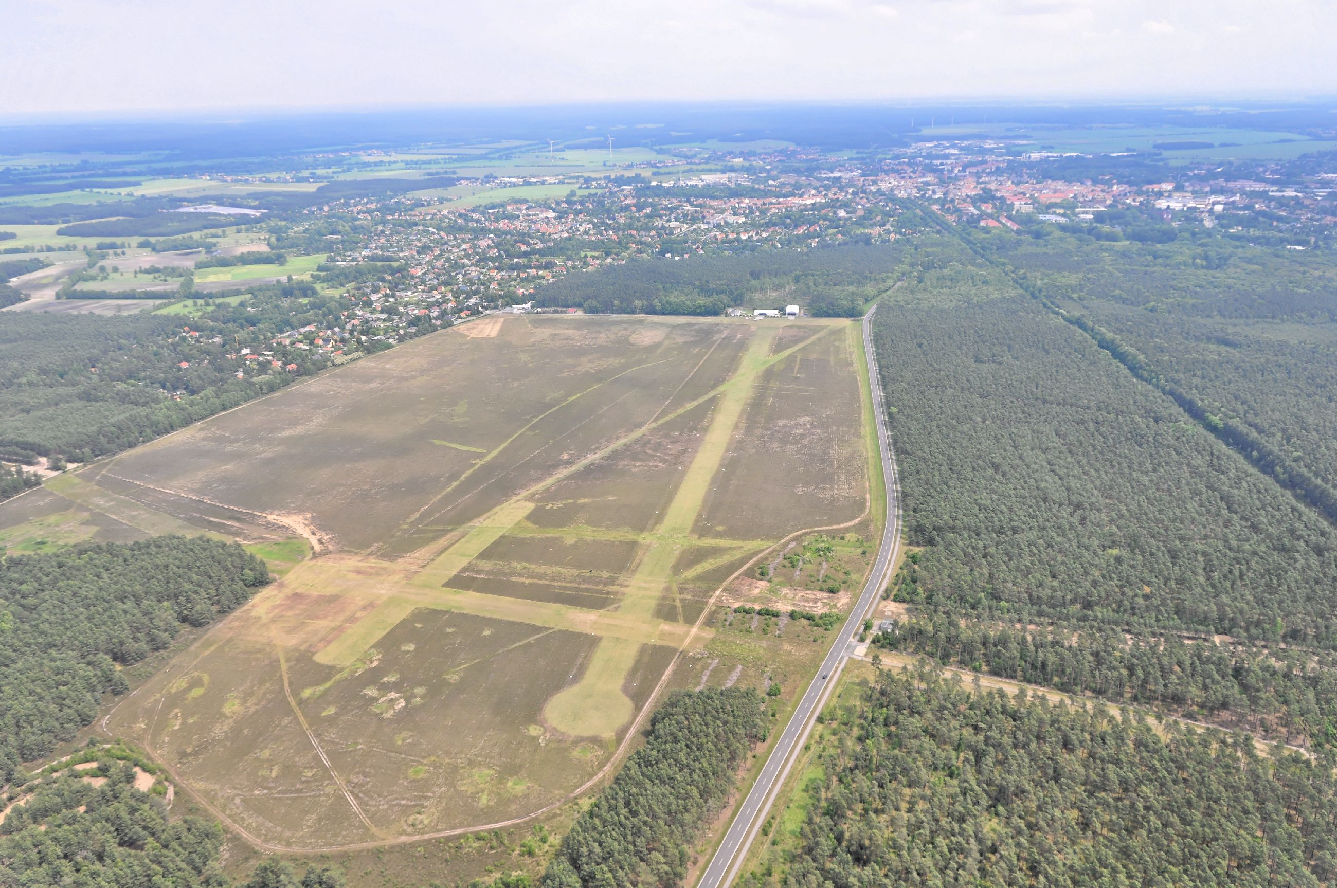 Überführungsflug vom Flugplatz Schwarzheide-Schipkau über Potsdam, Lüneburg zum Flugplatz Nordholz-Spieka